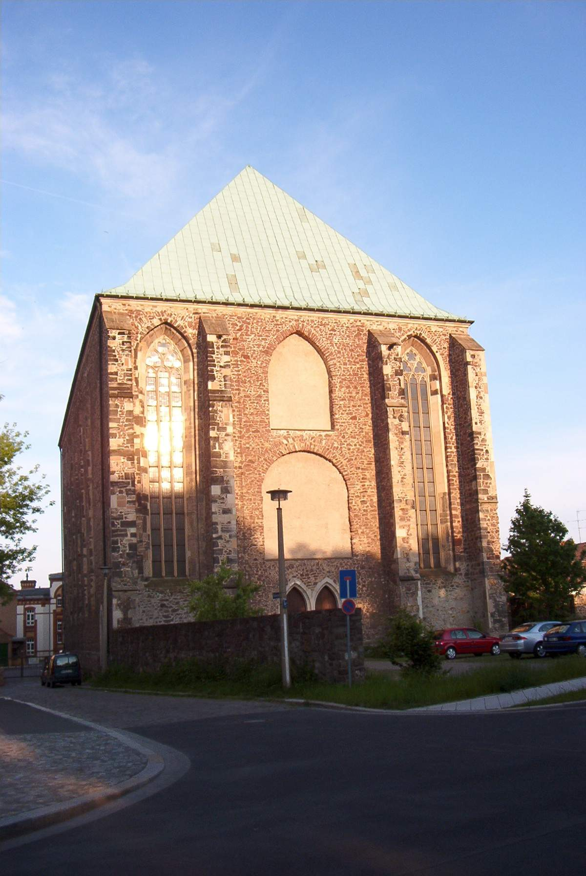 Westseite der Wallonerkirche in Magdeburg